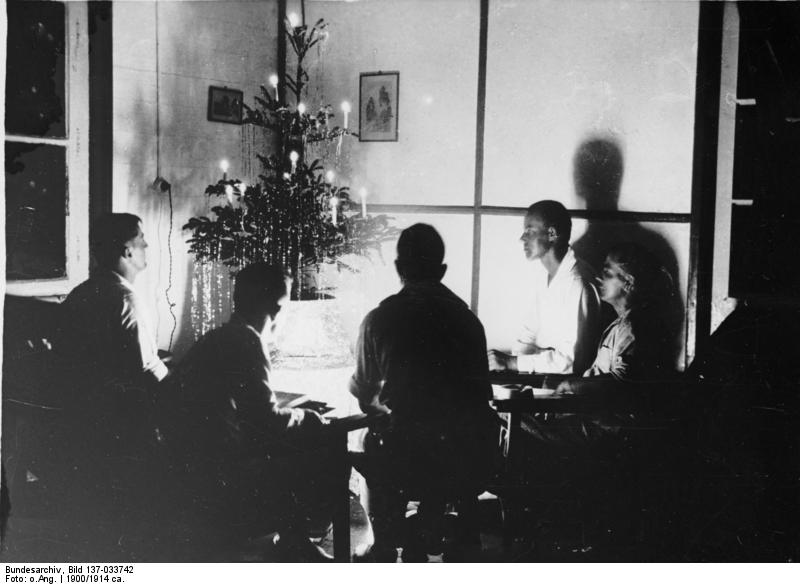 Kamerun, deutsche Christnacht